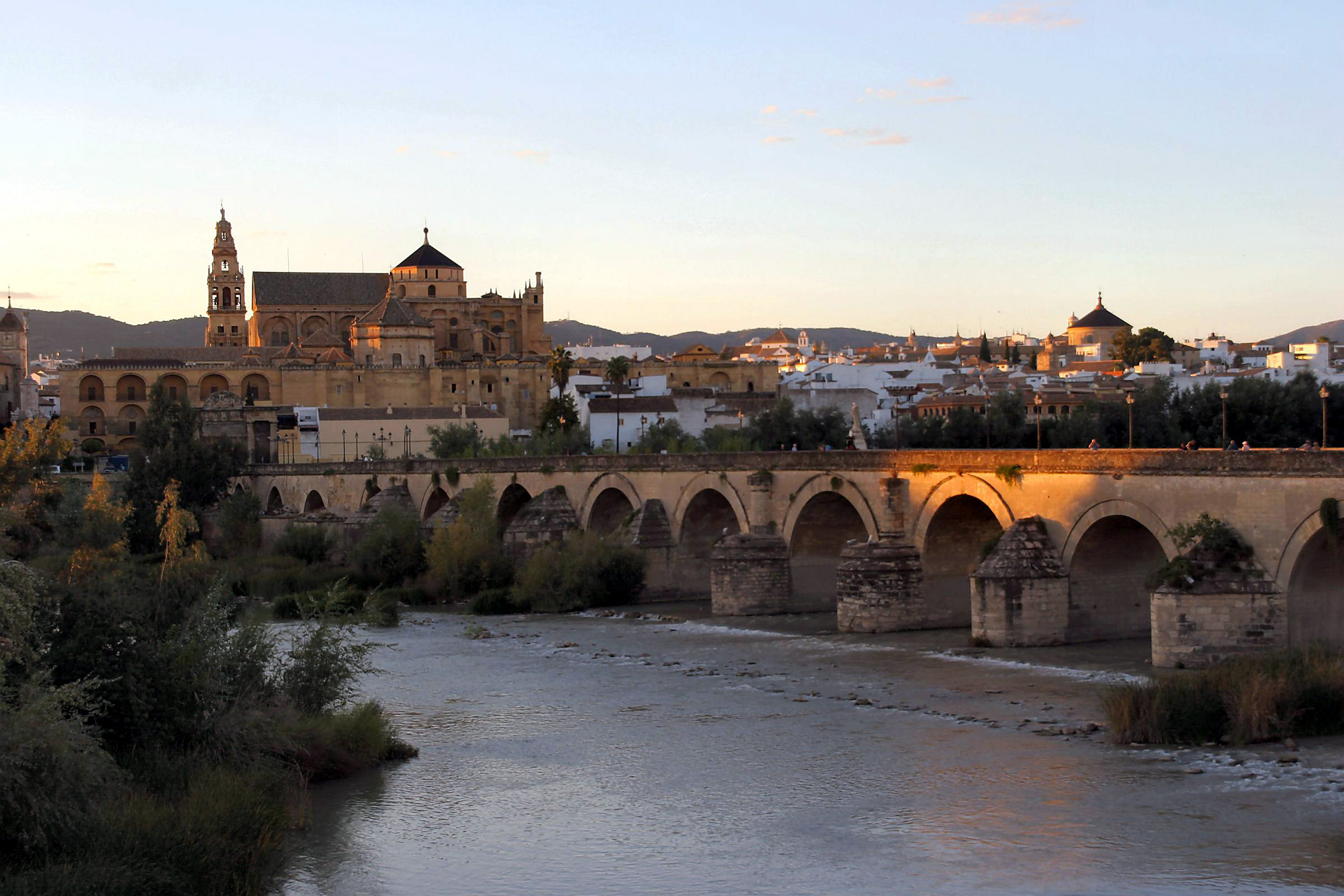 Puente romano de Córdoba